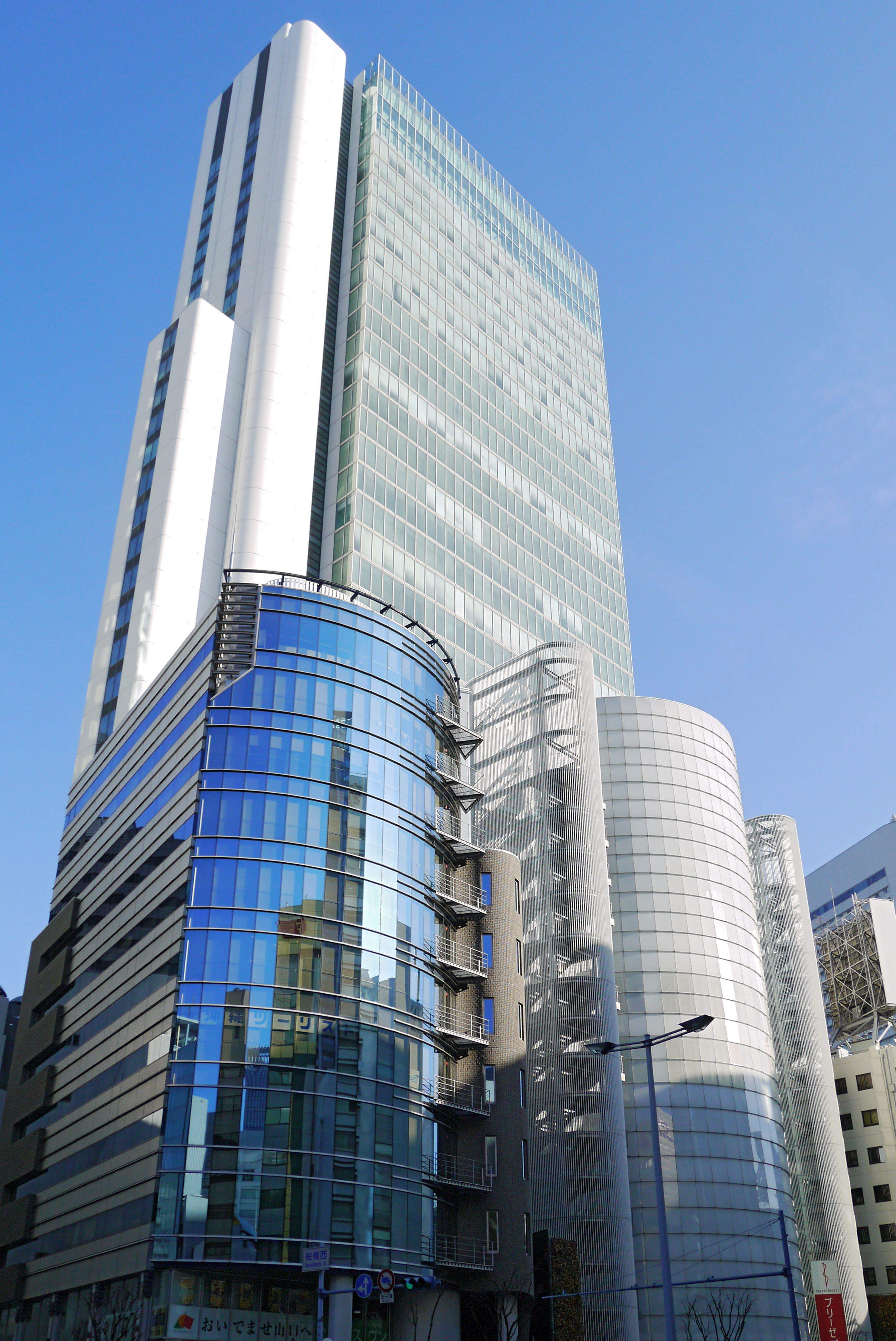 Breeze Tower (ブリーゼタワー), Osaka, Osaka prefecture, Japan